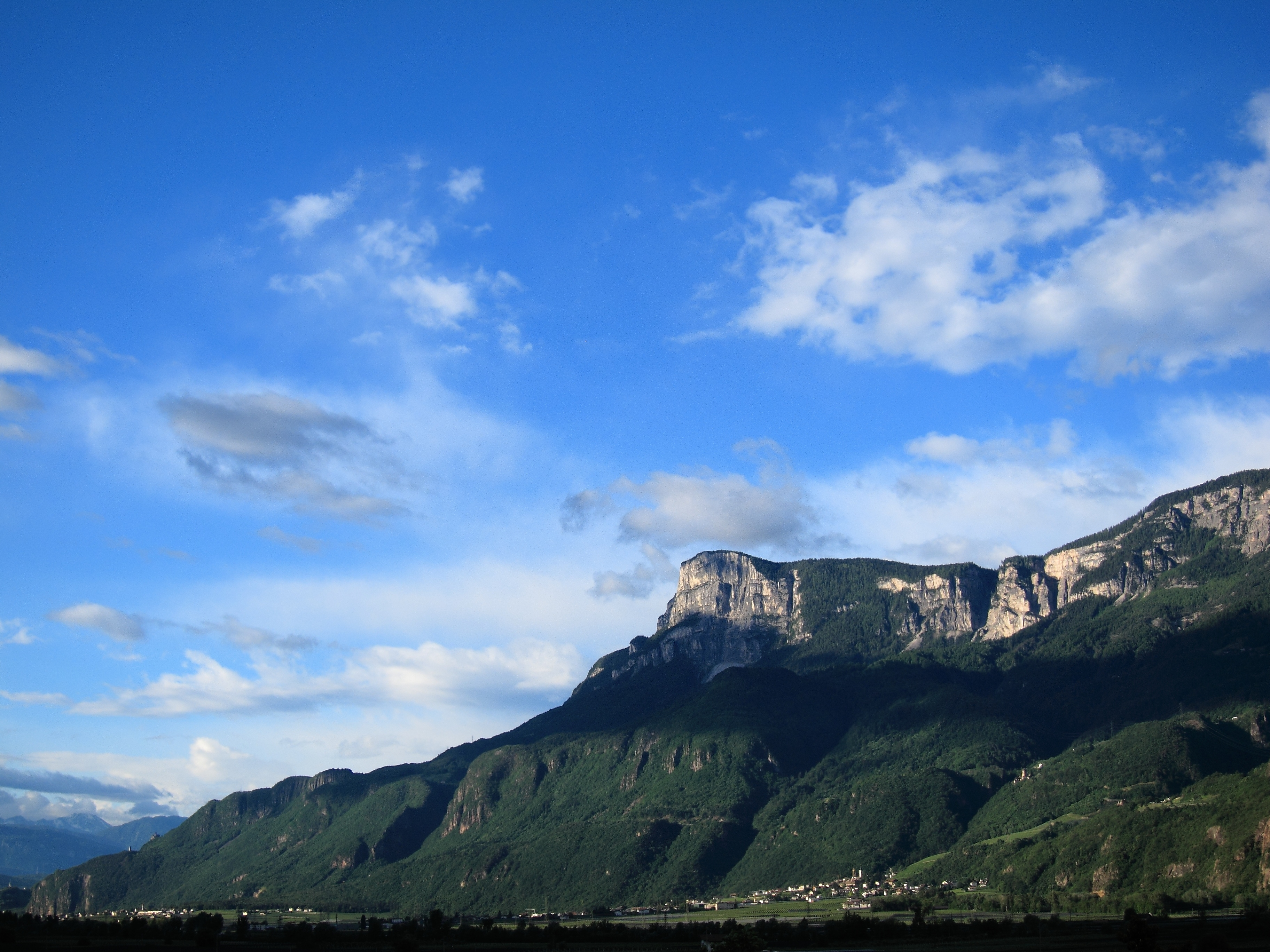 Morning Panorama